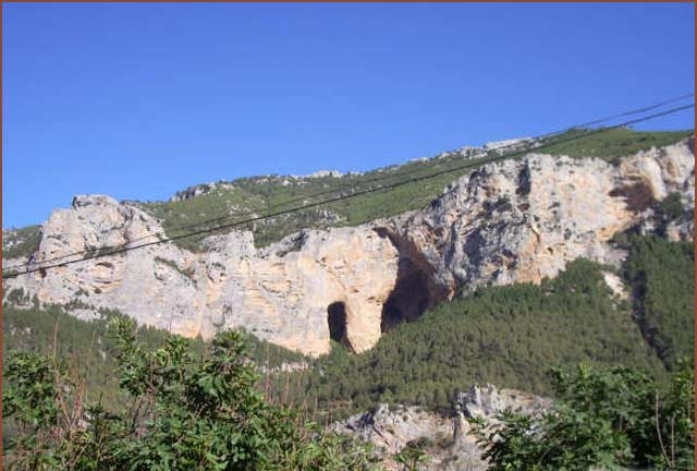 Paraje de las Cuevas de los Sanguijones (Sierra Segura-Santiago-Pontones-Jaén)